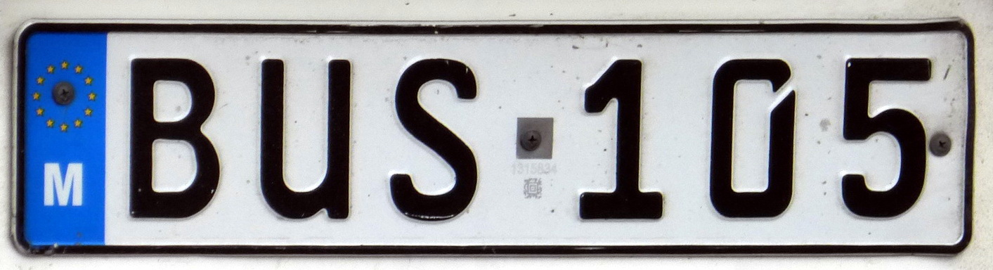 Nummernschild "BUS" eines Linienbusses auf Malta